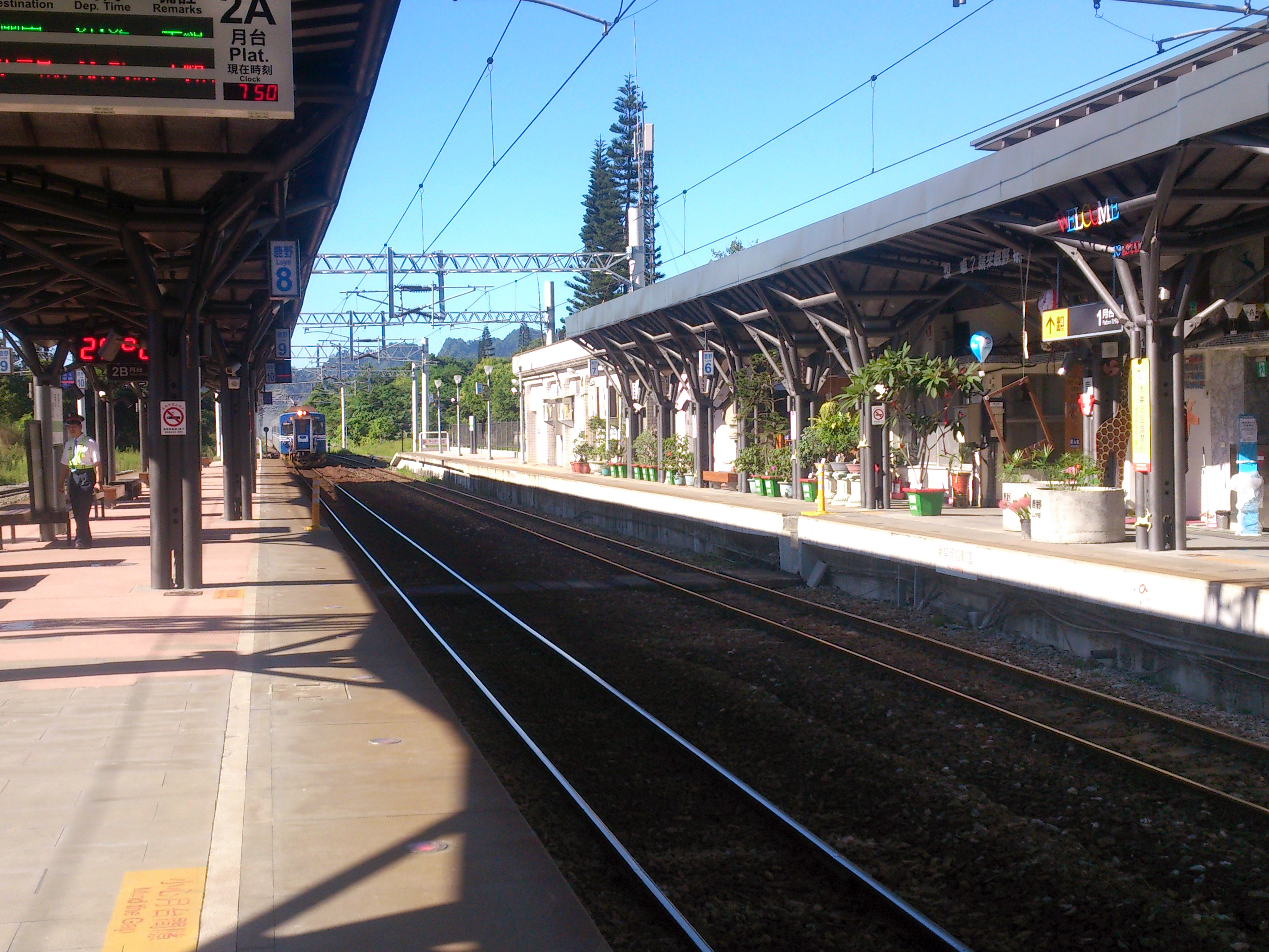 鹿野車站月台